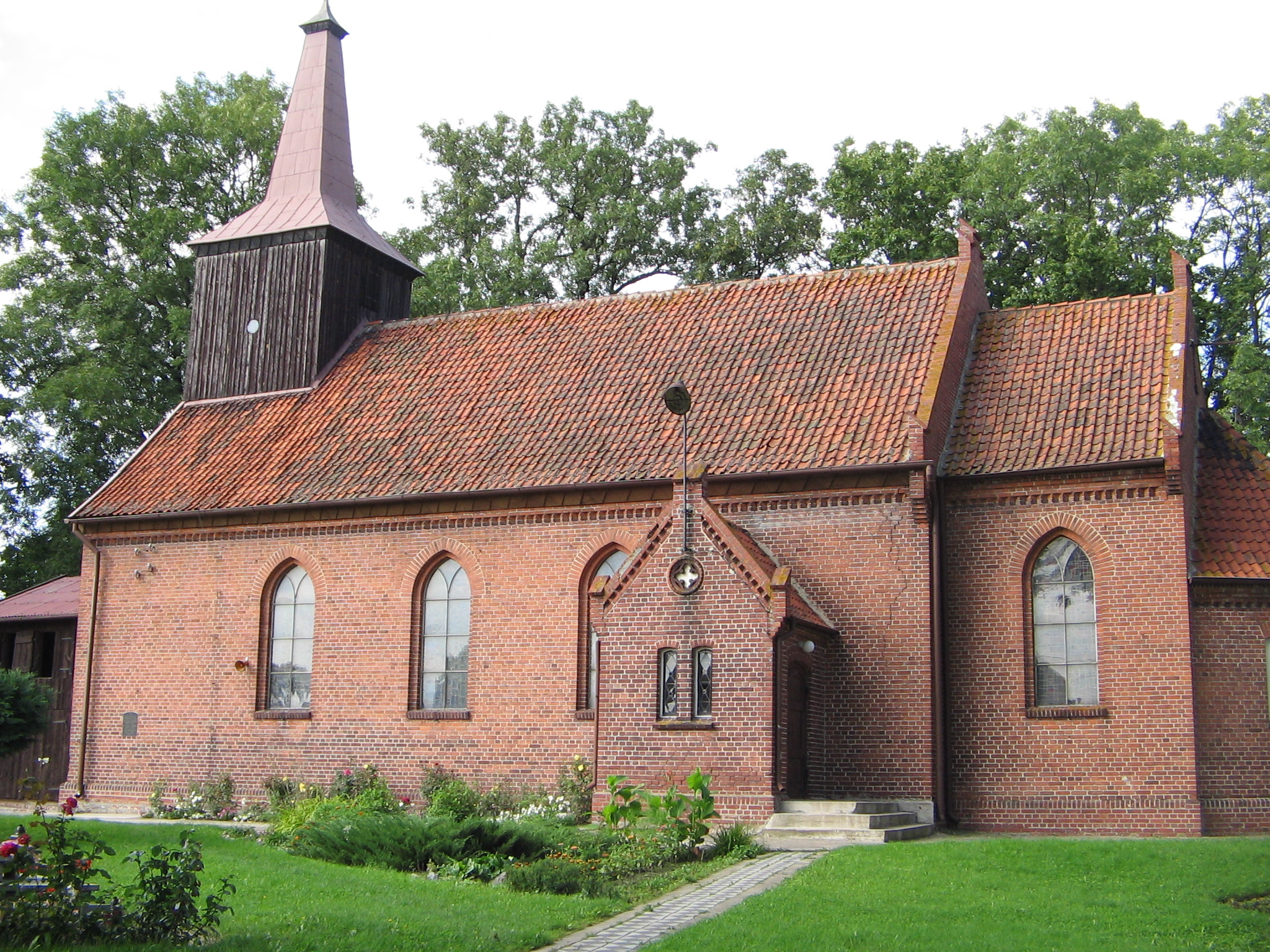 Lasowice Wielkie 76 - rzymskokatolicki kościół parafialny p.w. św. Andrzeja Apostoła, 1896